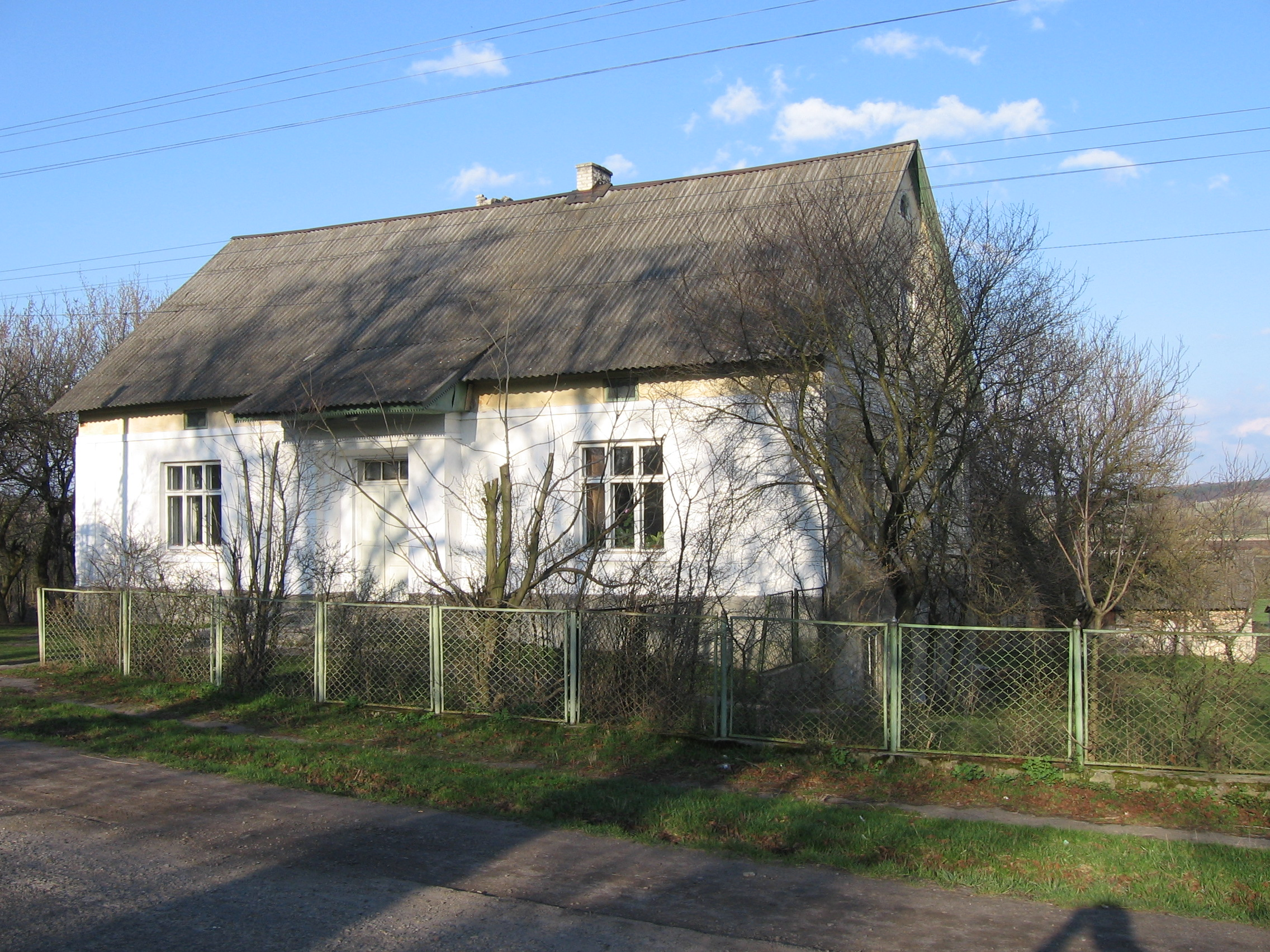 Помістя родини Кендзєрських в Мерещеві (тепер - початкова школа)